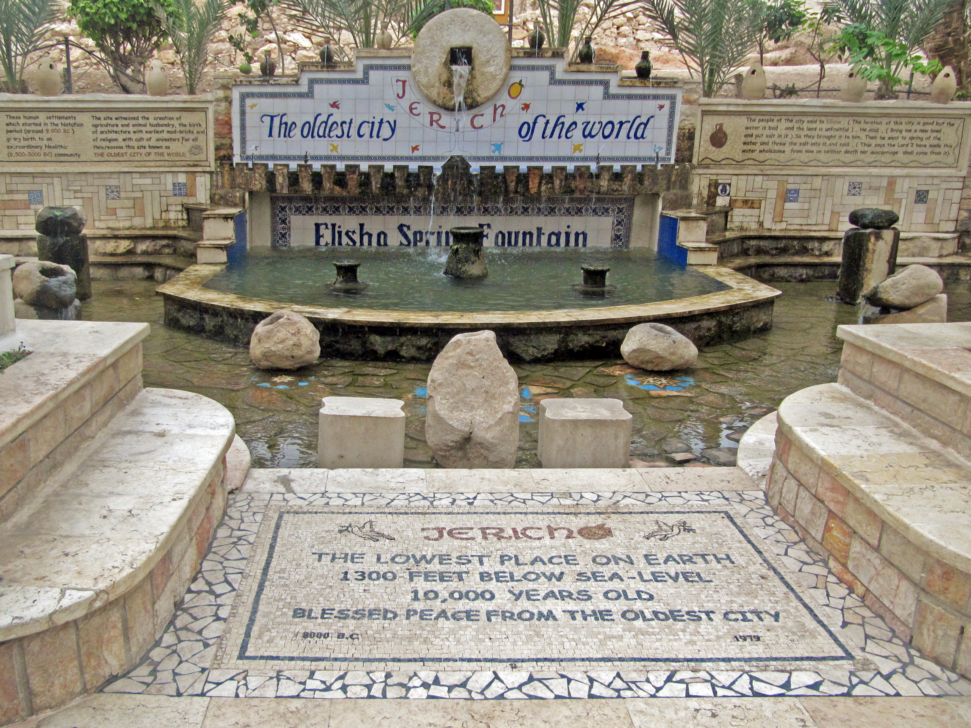 Jericho (more details in the photo's title) יריחו (מידע נוסף בשם הקובץ)